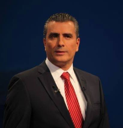 Académico, empresario y político de Costa Rica.